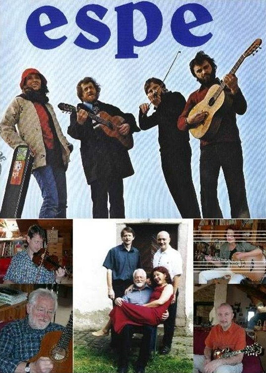 Foto-Collage der Liedermacher-Gruppe ESPE